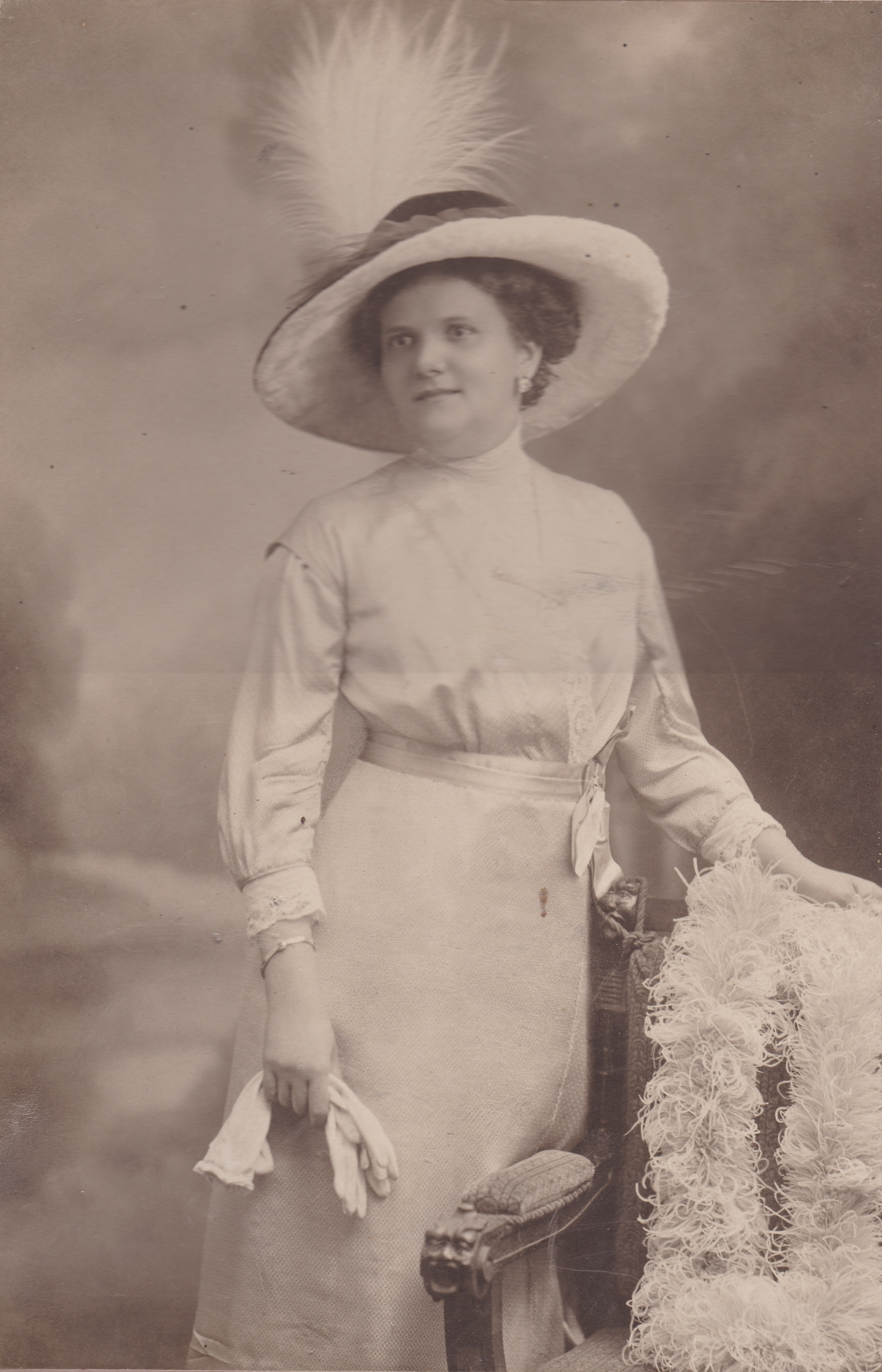 Lenz Gyuláné Gömöry Anna Mária Etelka (1874–1946), nagykereskedő felesége, Lenz József (1897–1965) nagykereskedő, kereskedelmi tanácsos édesanyja, Lenz Klára (1924–2013) gobelinművész nagyanyja